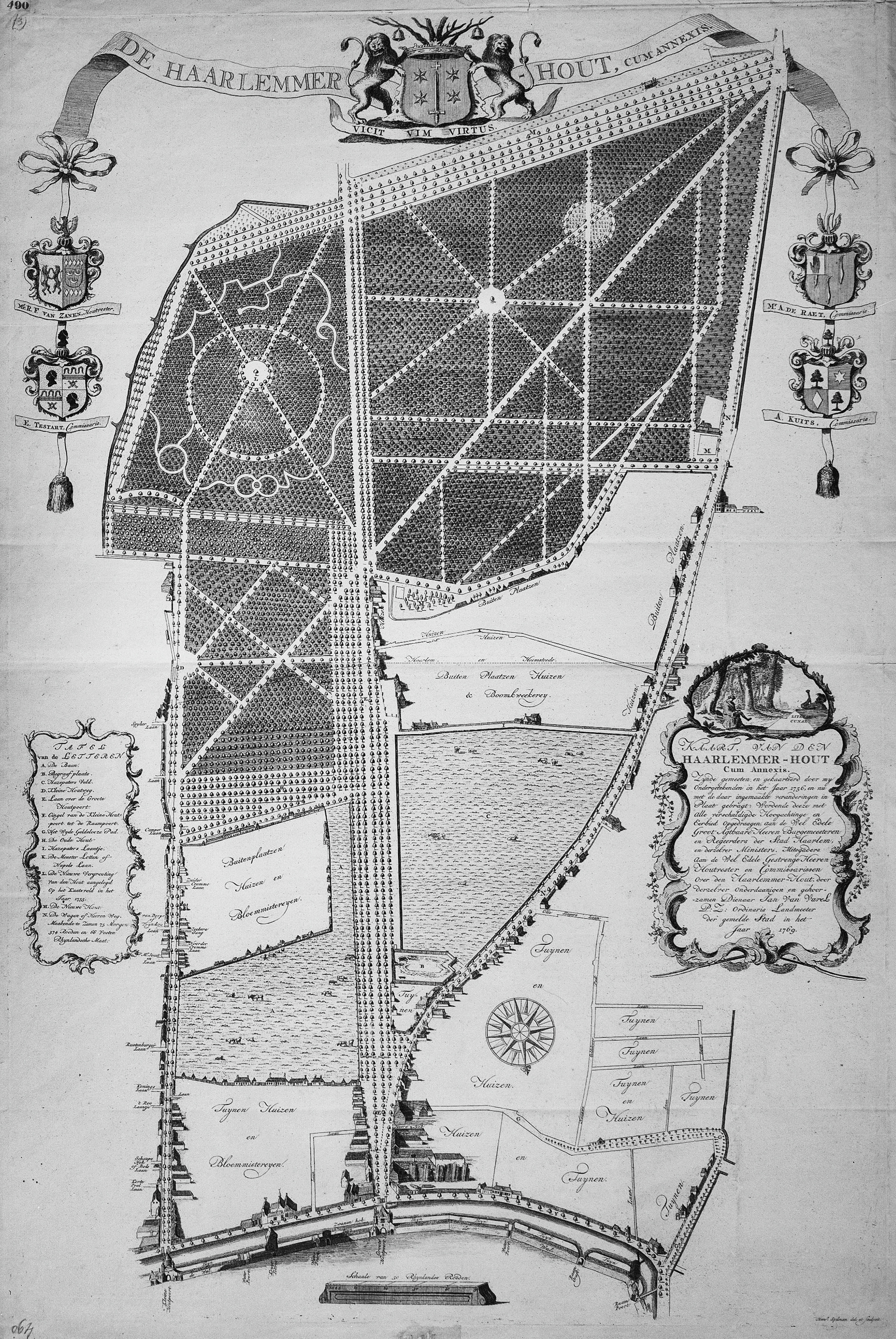 Plattegronden en overzichten: Haarlemmerhout, kaart in bezit van Gemeente Archief